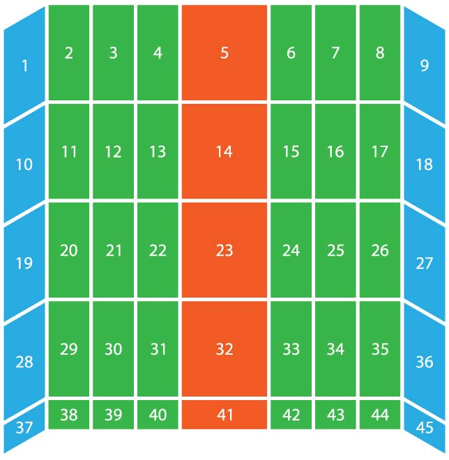 Esquema en el que se muestra la distribución de las esculturas en el retablo mayor de la catedral de Sevilla, (España).